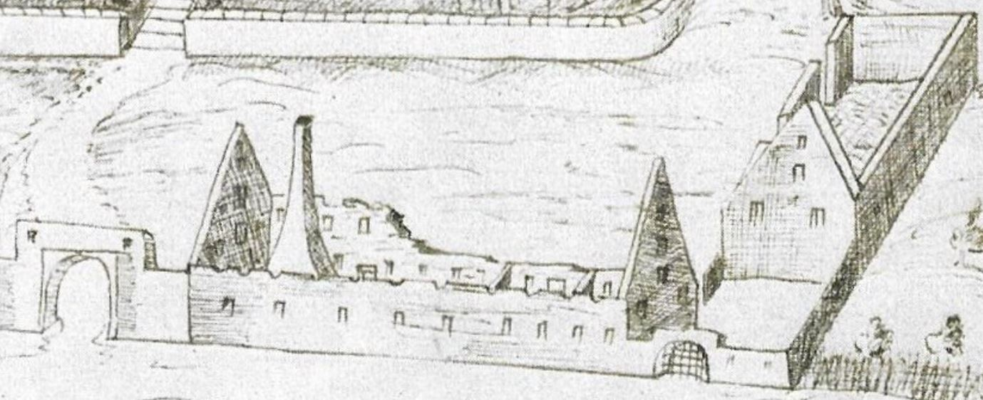 Auszug einer Zeichnung des Schlosses Cronheim